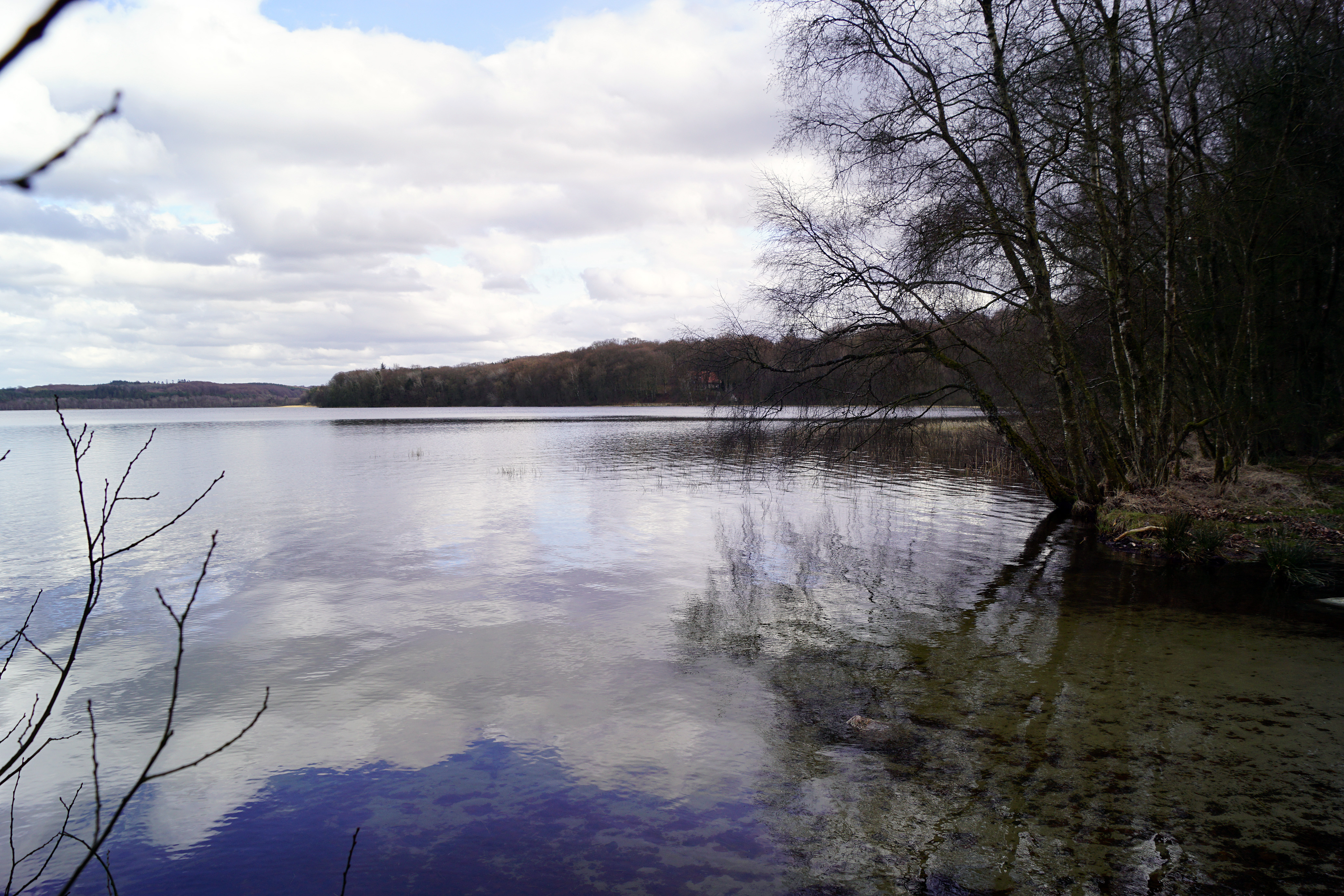 Madum Sø set fra vest